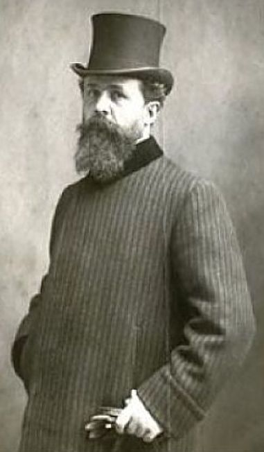 Henri Gustave Jossot, né à Dijon le 16 avril 1866 et mort à Sidi Bou Saïd le 7 avril 1951, est un dessinateur, caricaturiste, peintre, affichiste et écrivain libertaire français.